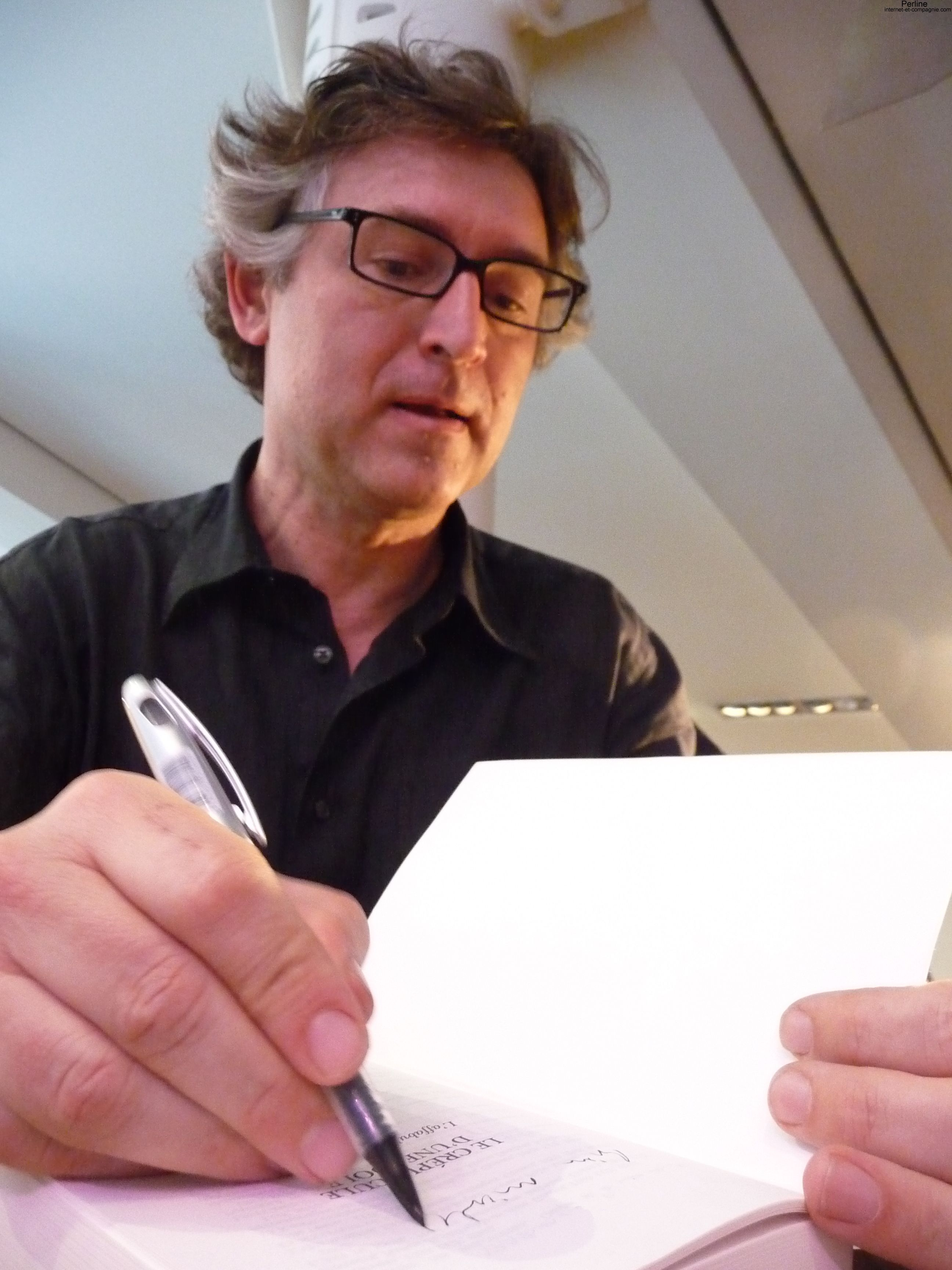 Michel Onfray lors d'une conférence intitulée "Le postanarchisme expliqué à ma grand-mère" au Théâtre du Rond-Point (Paris, France).